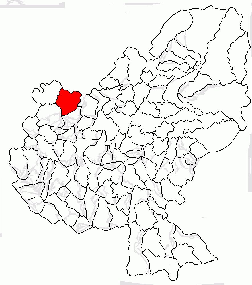 Categorie:Hărţi ale judeţului Mureş